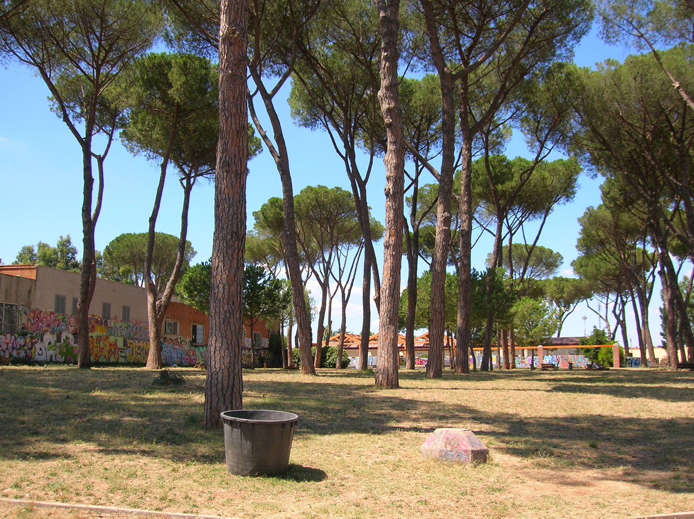 Parco delle Energie, via Prenestina, Pigneto, Municipio VI di Roma, Lazio, Italia